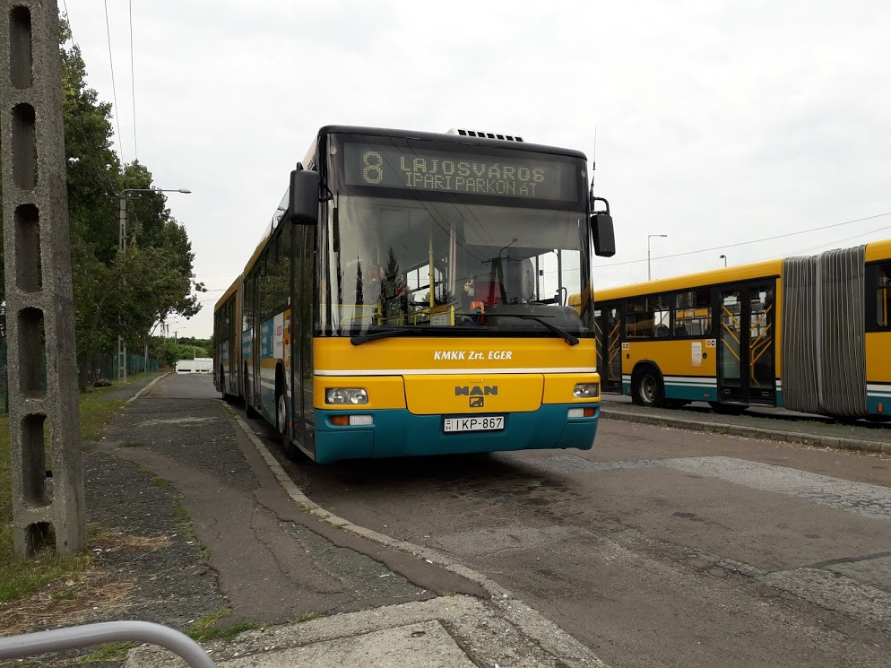 MAN SG 263 busz az egri 8-as vonalon